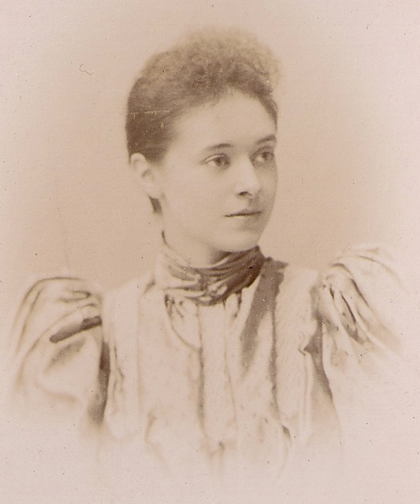 fotografisch portret Anna Kernkamp